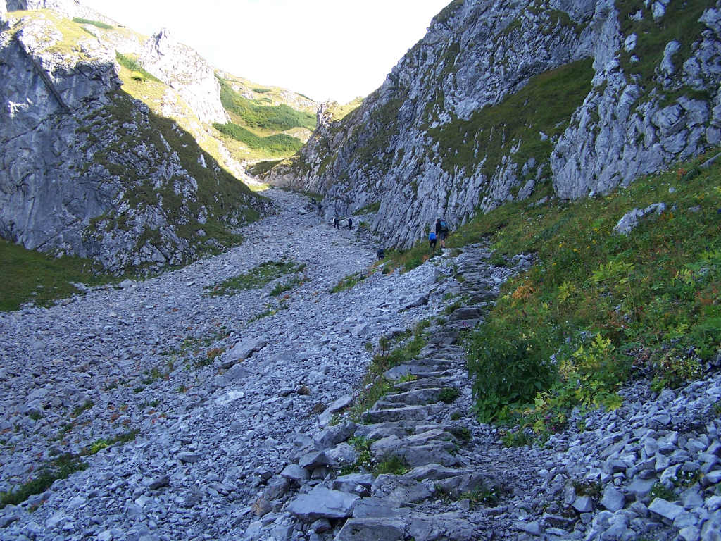 Kobylarzowy Żleb (Tatra Mountains, Dolina Miętusia)